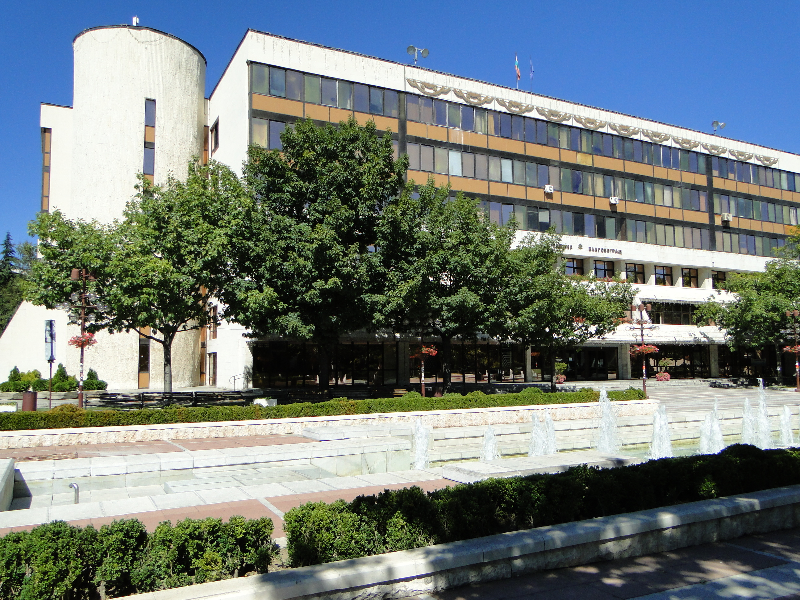 Благоевград